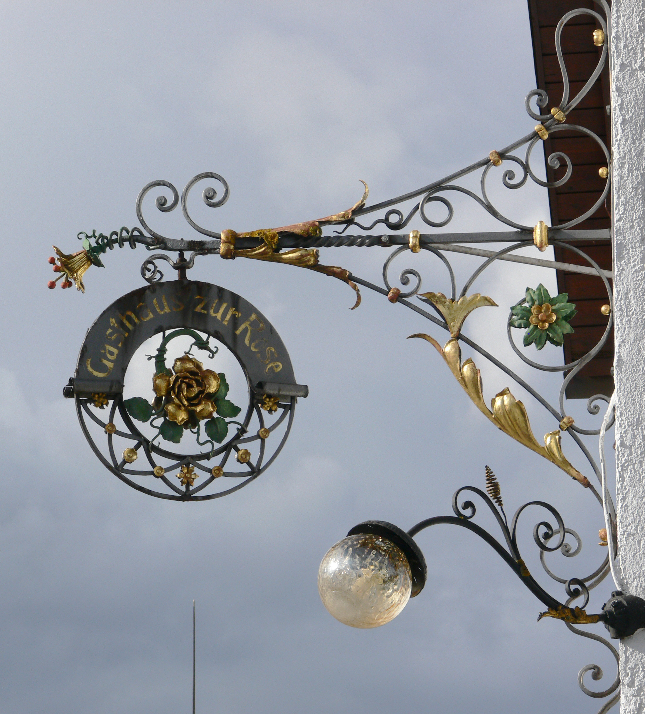 Wirtshausschild Gasthaus Rose, Wuchzenhofen, Leutkirch im Allgäu